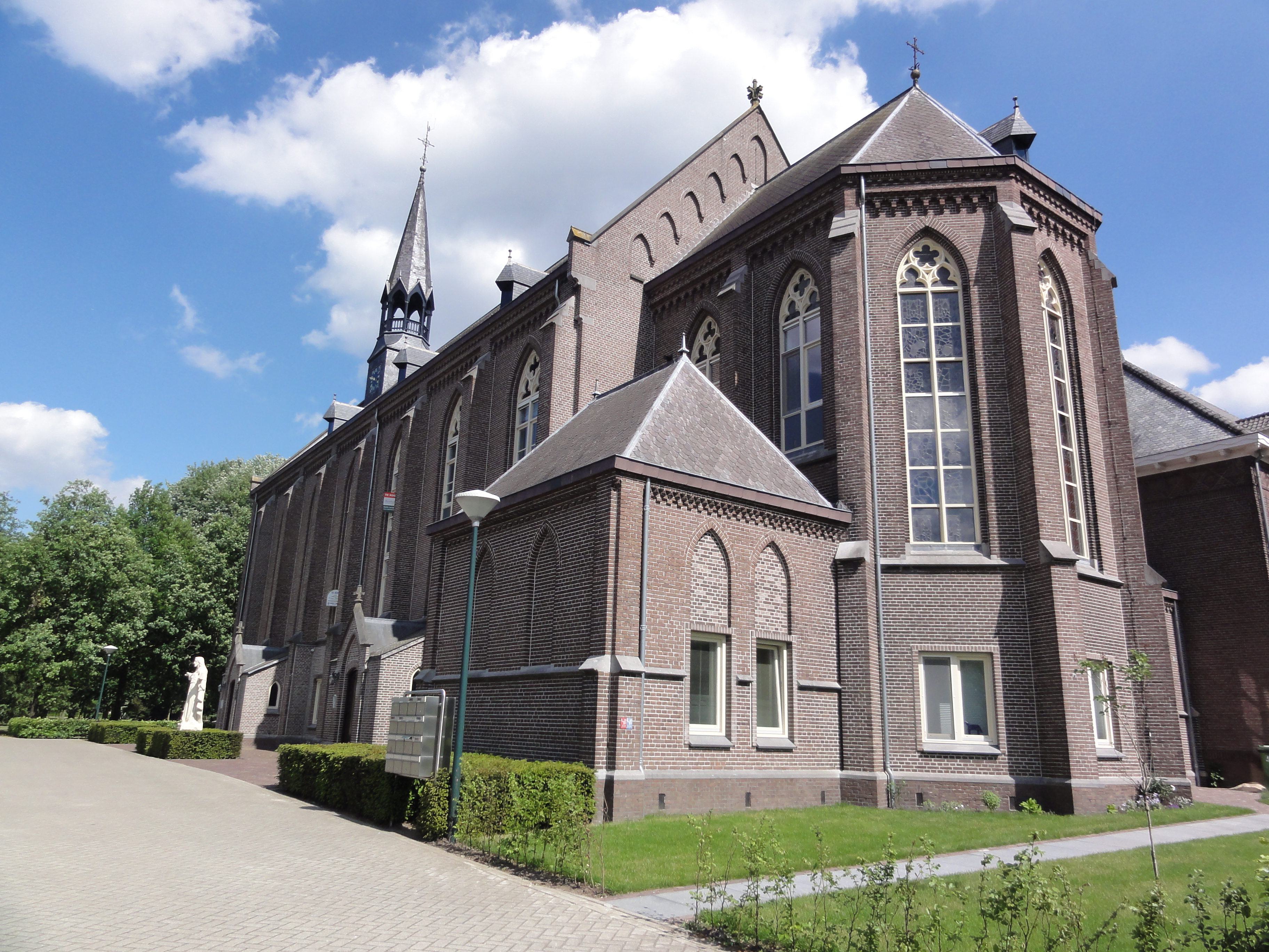 Boekel Huize Padua Hartbeeld ervoor